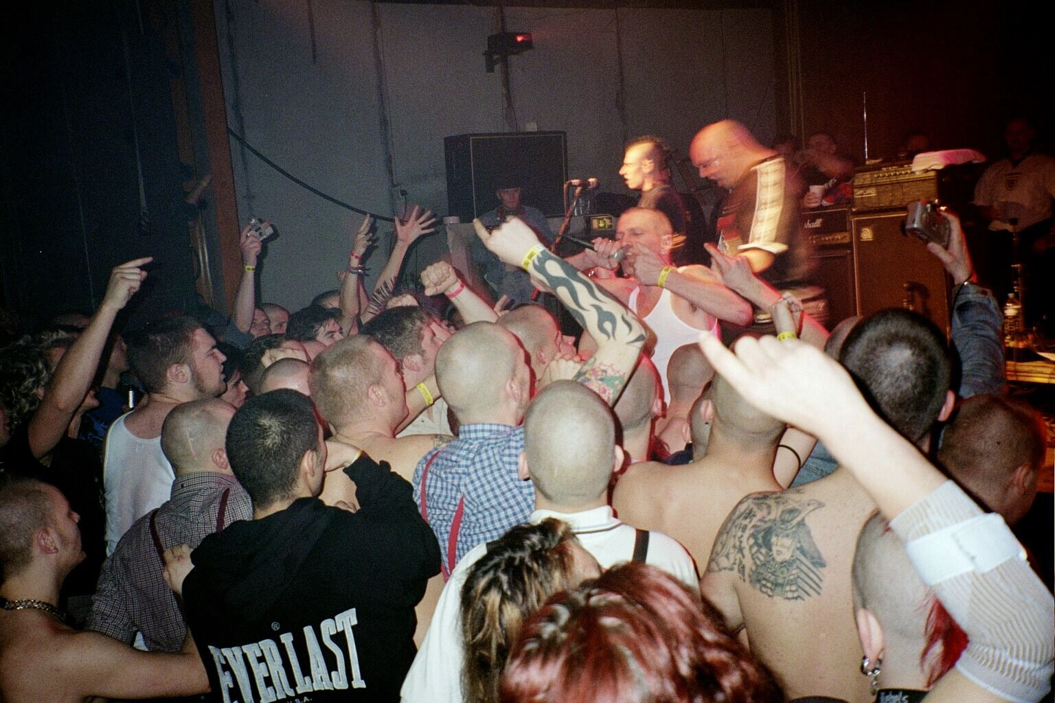 Beschreibung: Bild vom Punk and Disorderly Festival in Berlin 2003, The Bussines live Quelle: selbst fotografiert Fotograf oder Zeichner: Rainer Theuer originaly uploaded to de.wikipedia by Calzinide, 21:23, 3. Nov 2005